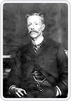 Autore sconosciuto, Enrico Nencioni